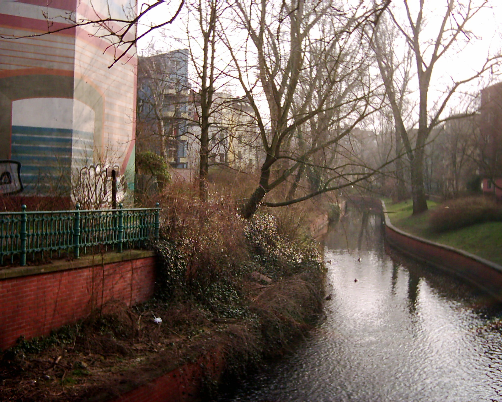 Von der Wiesenstraße geht es zur Pankstraße